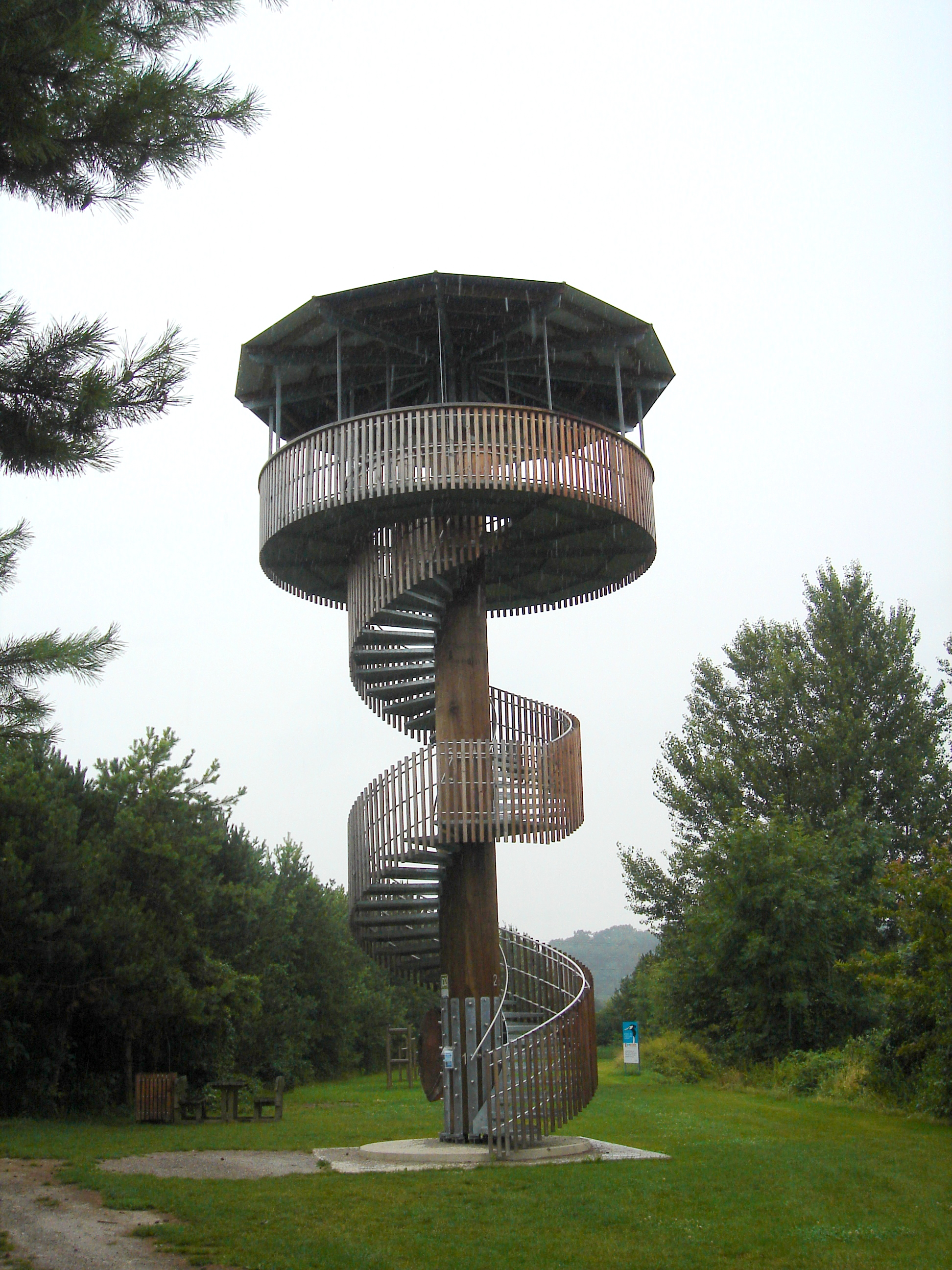 Aussichtswarte zwischen den Viehofner Seen